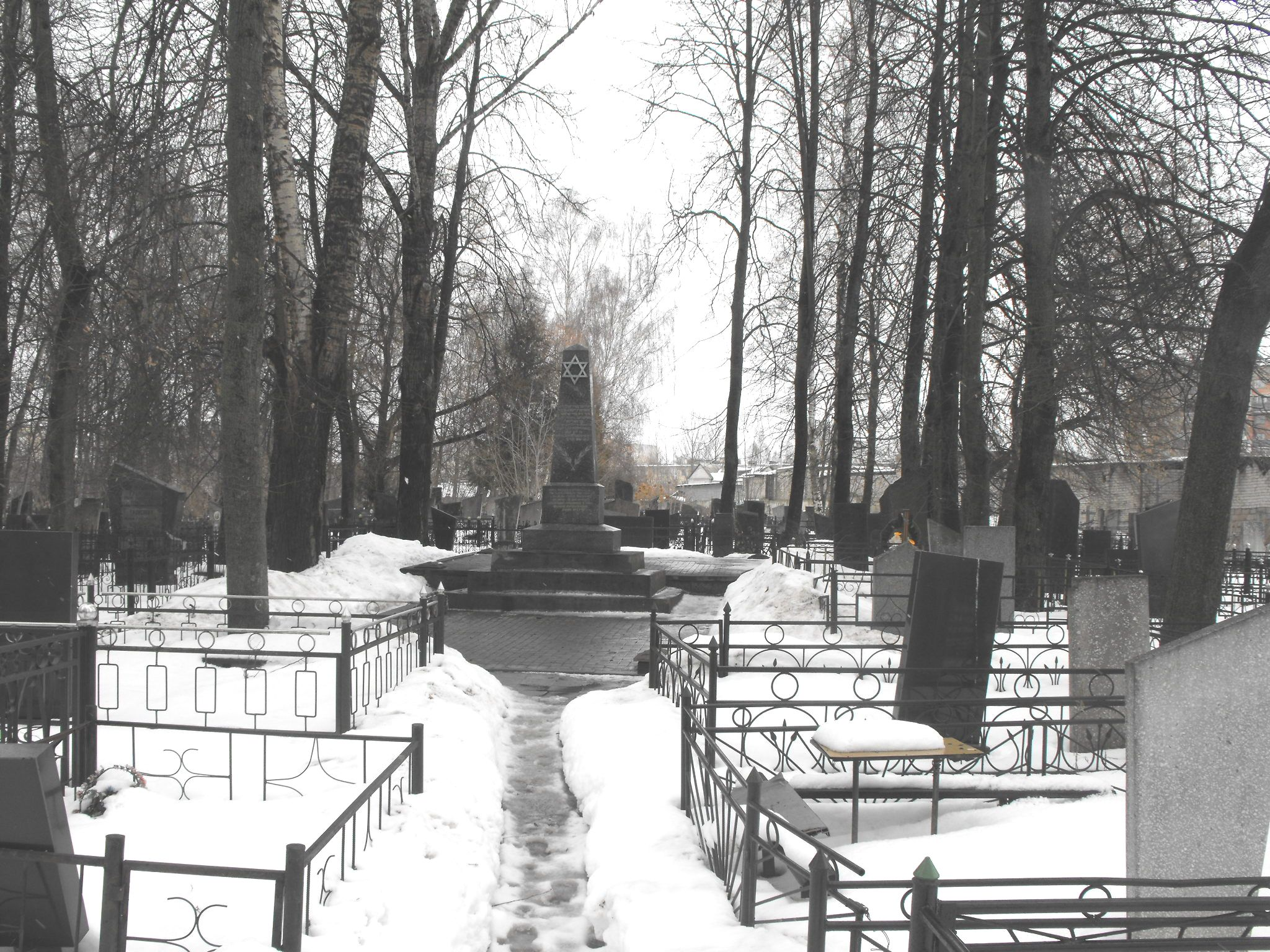 Памятник, возведенный на Машековском еврейском кладбище в память о более чем 2 000 убитых евреях Могилевского гетто.